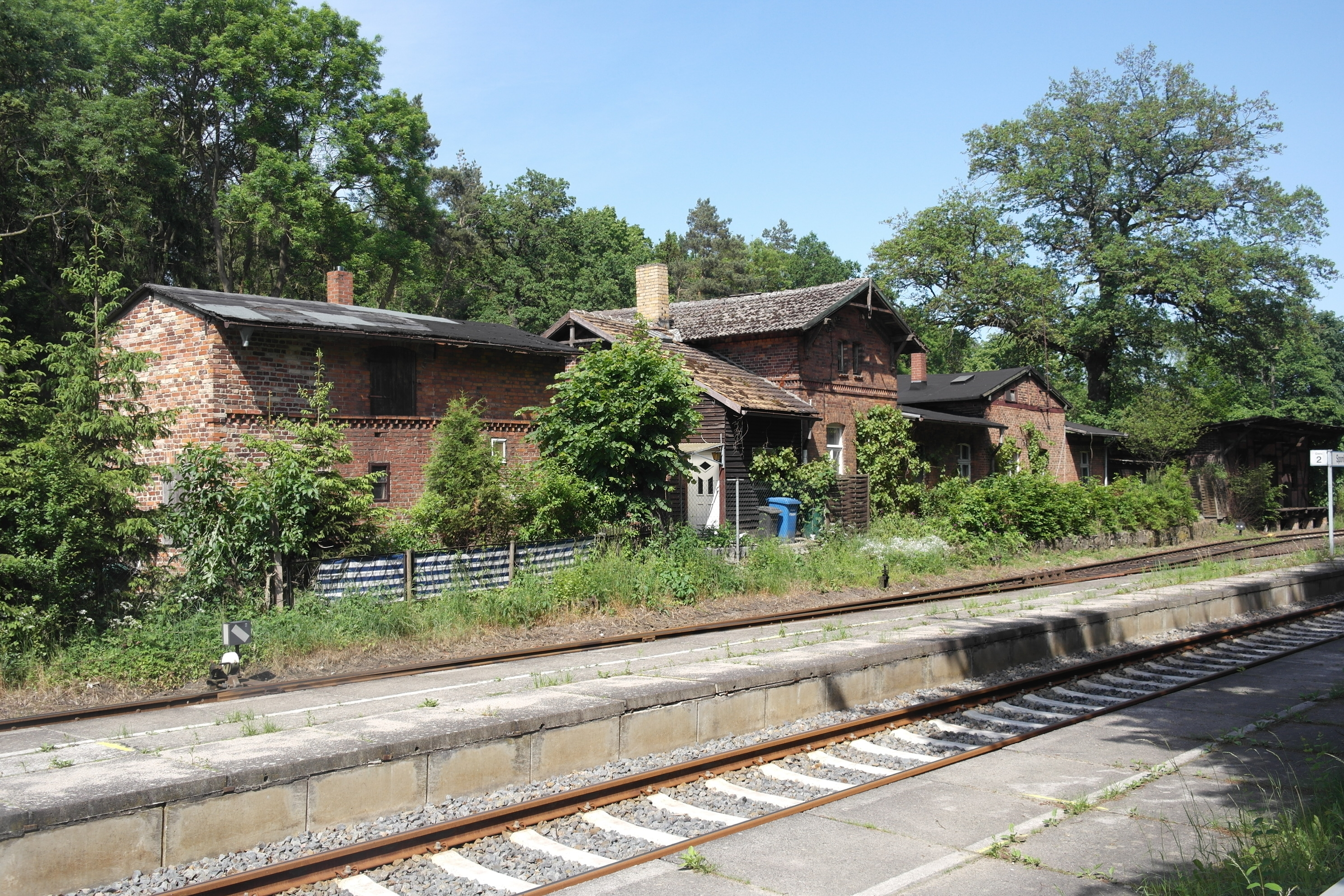 Bahnhof Sponholz,Nebengebäude auf der Nordseite der Gleise